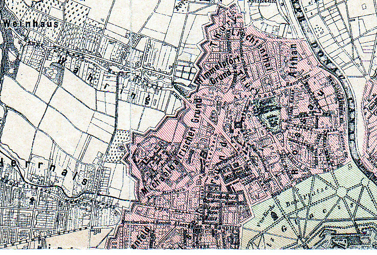 Ausschnitt aus einem Stadtplan des Jahres 1856, reproduziert in der Plandarstellung Oertliche Entwicklung der Stadt Wien vom Mittelalter bis zur Gegenwart, nach amtlichen Quellen bearbeitet von Conrad Grefe, Verlag des Wiener Magistrats, Wien 1892; der Ausschnitt zeigt die heutige Währinger Straße im heutigen 9. und 18. Wiener Gemeindebezirk; die 1850 nach Wien eingemeindeten Flächen sind rosa schraffiert, das Glacis vor der Stadtmauer ist grün schraffiert.